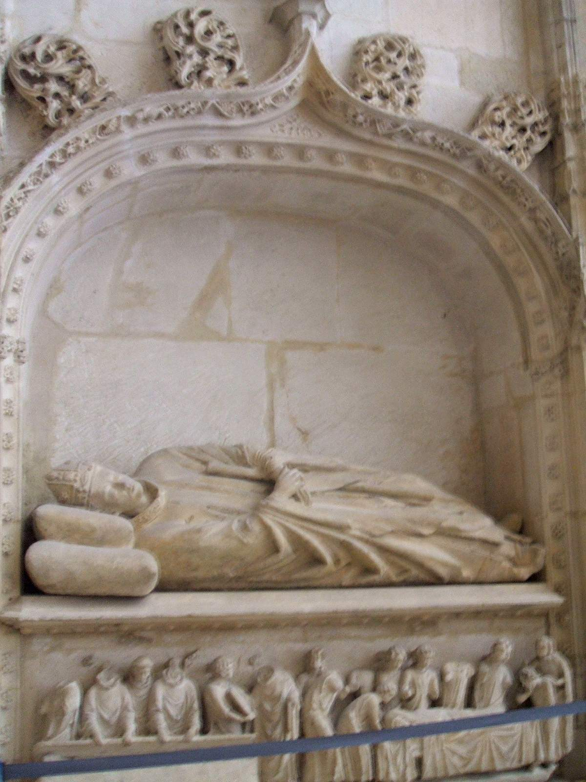 Capilla del Condestable, Catedral de Burgos